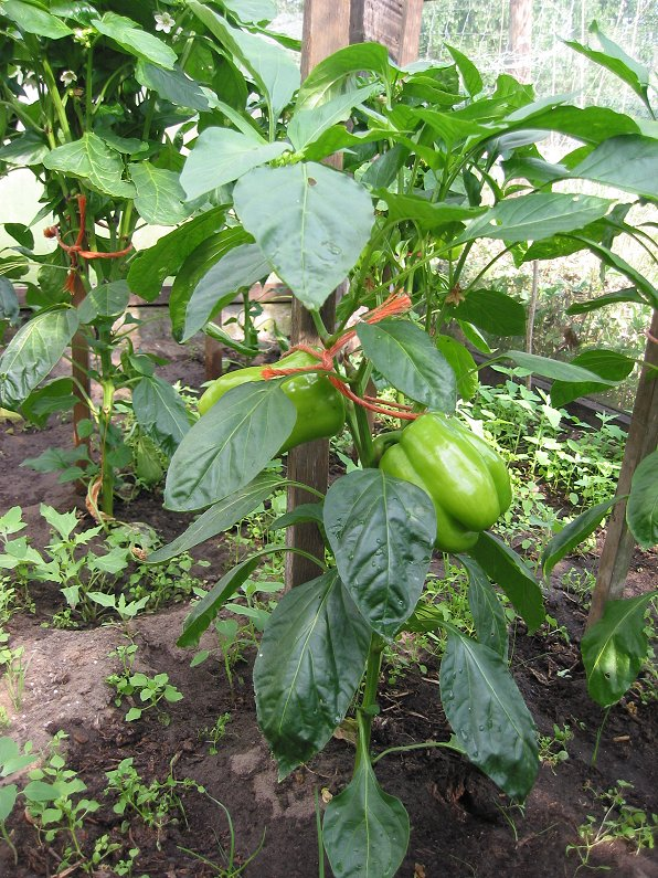 zelfgemaakte foto van paprika ras Rumba; eind juli